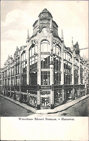 Warenhaus Eduard Bormaß in Hannover, Große Packhofstraße / Heiligerstraße; gegründet 1899, Neubau 1905-1908, nicht erhalten